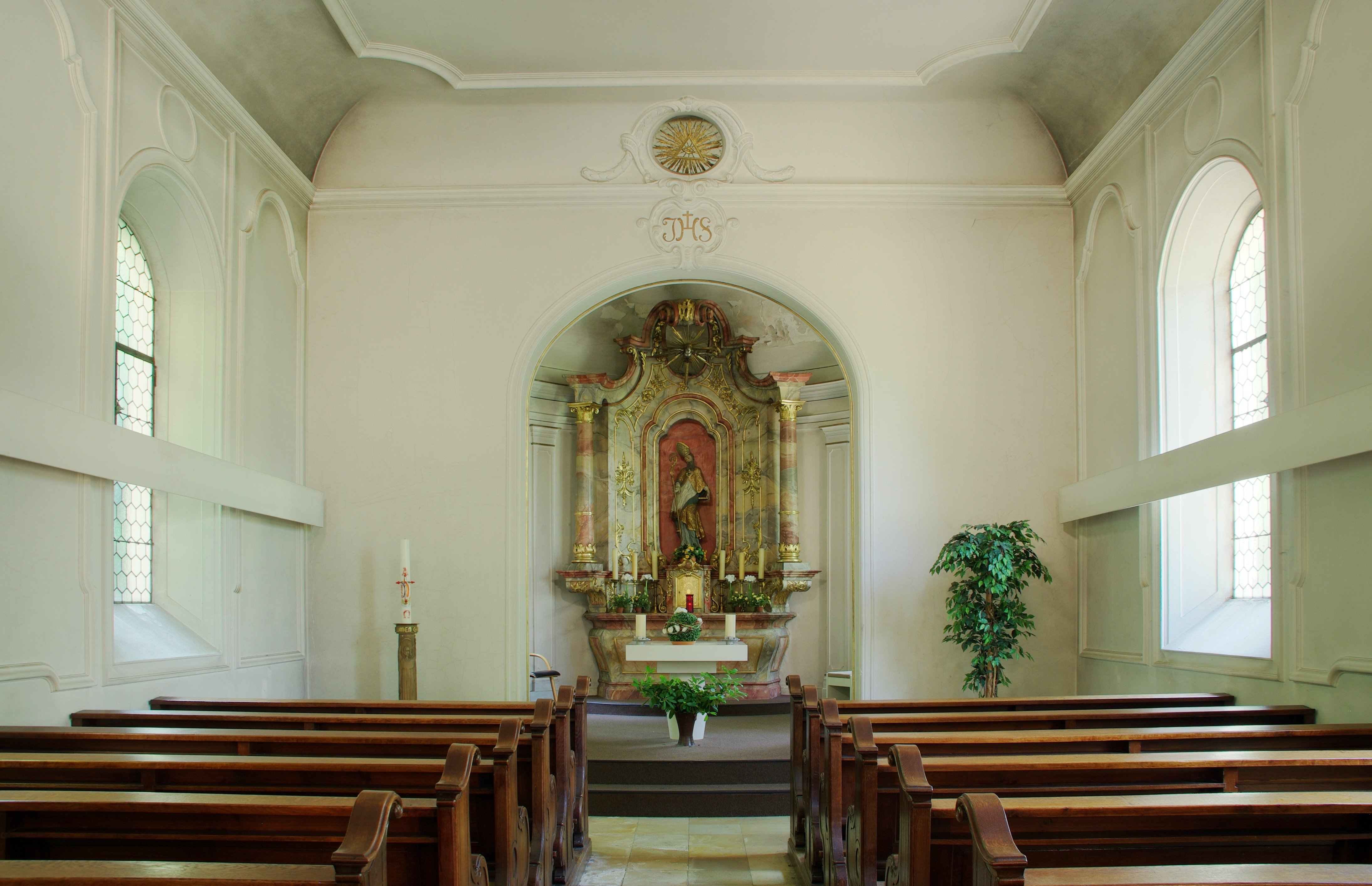 Das Dominikanerkloster St. Albert der Innenraum der Kapelle